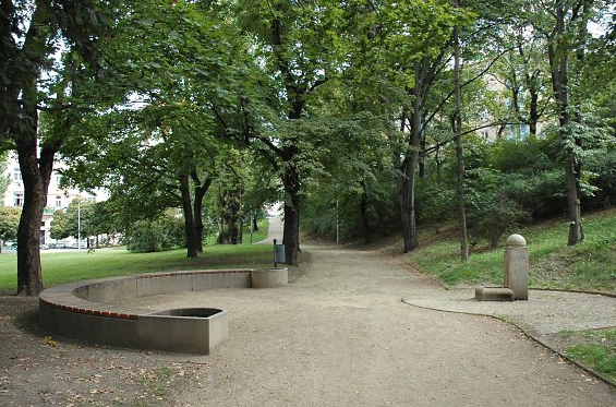 Městský park Fidlovačka - Praha